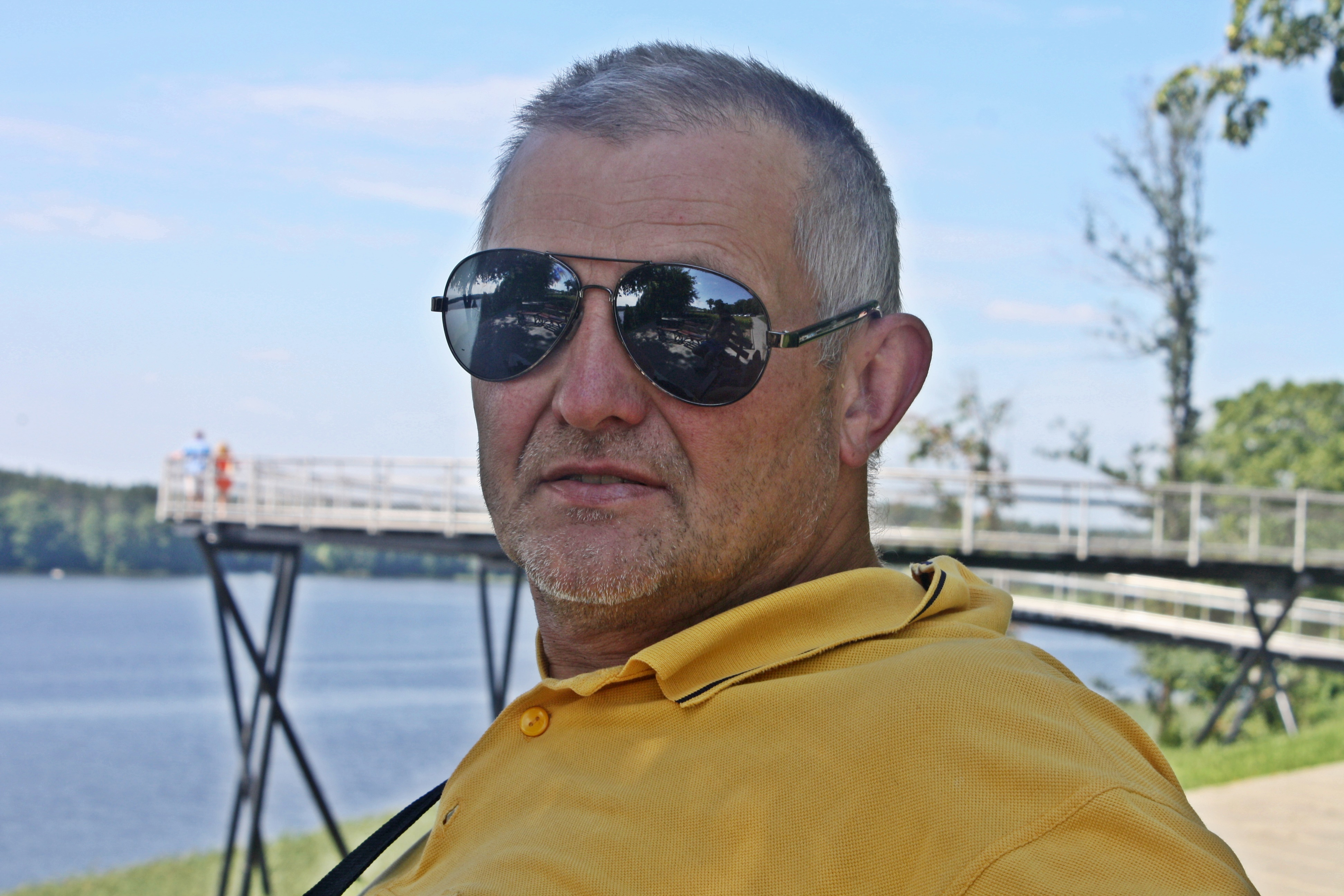 Alfridas Pajuodis